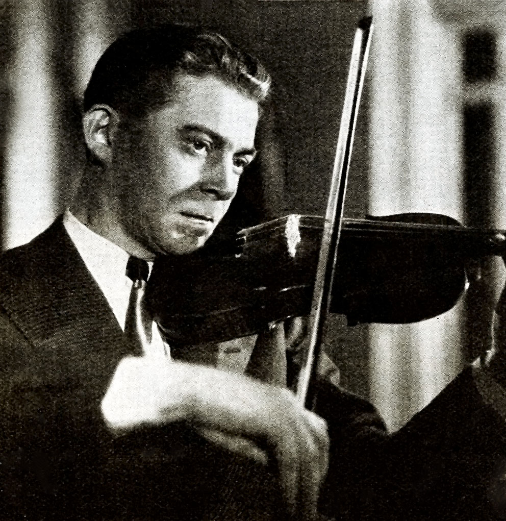 screen from the Italian film Amanti senza amore by Gianni Franciolini (1948), taken from magazine Almanacco del cinema (1951)